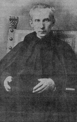 Włodzimierz Ledóchowski SJ (właściwie Włodzimierz Halka - Ledóchowski), (1866-1942) – polski jezuita, 26. Przełożony Generalny Towarzystwa Jezusowego.